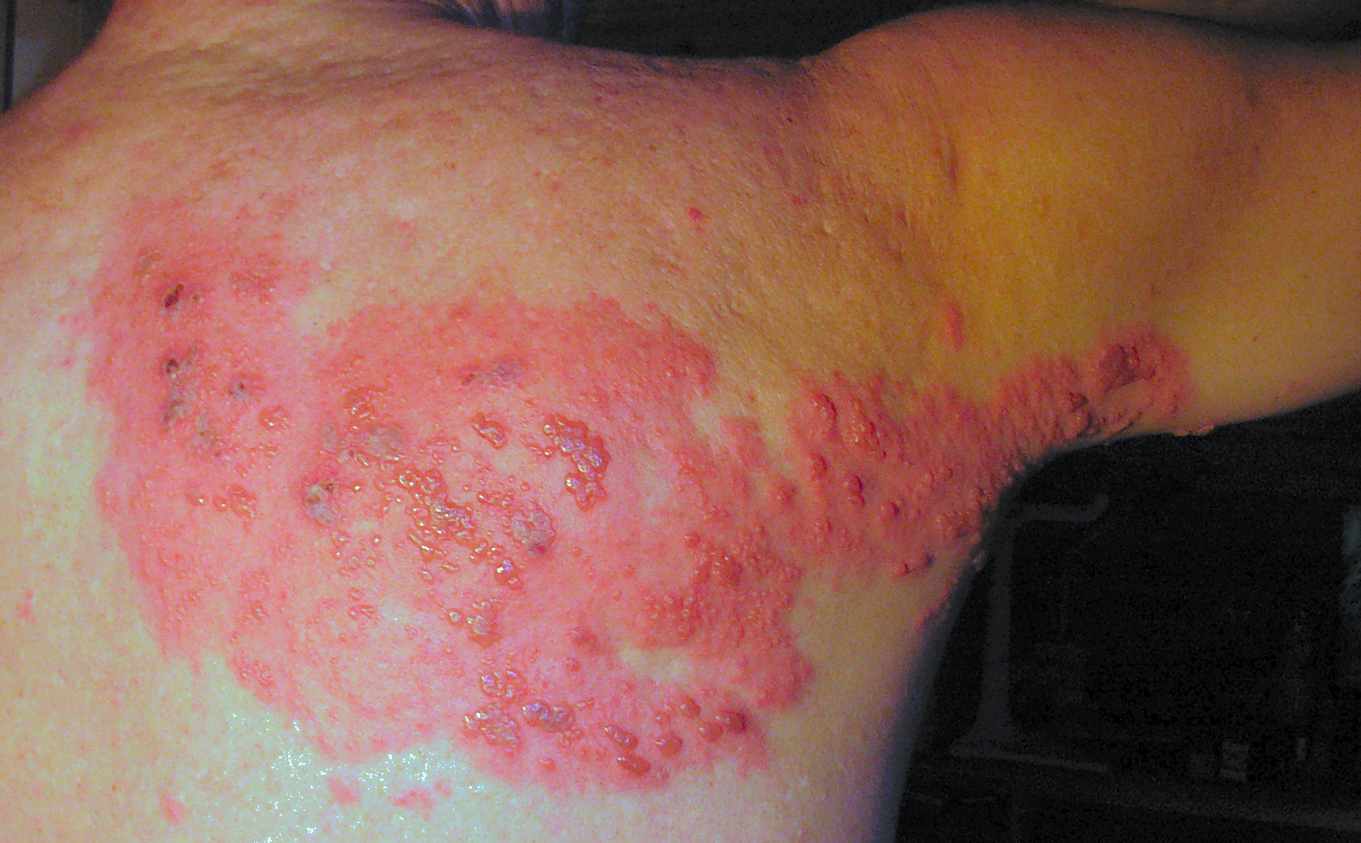 Herpes Zoster